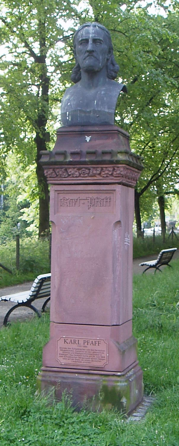 Esslingen am Neckar - Karl Pfaff-Denkmal auf der Maille. Bildhauer:Ernst Rau Fotografiert: selbst